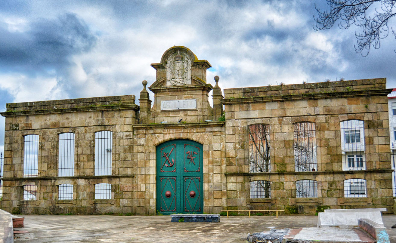 Puerta del Astillero frente al Cuadro de Esteiro, Ferrol (A Coruña).